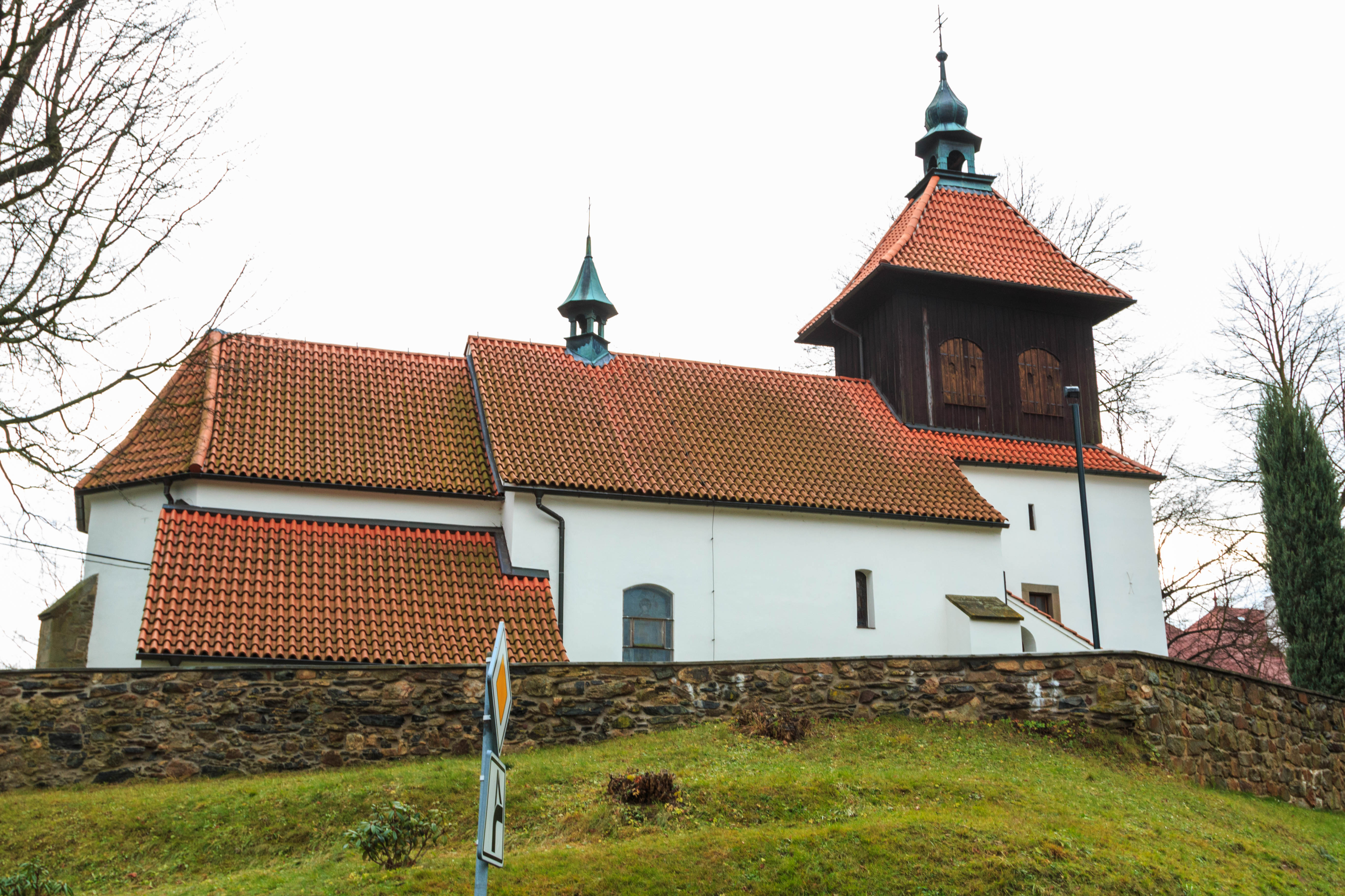 Kostel svaté Markéty, ve středu obce, Lučice (okres Havlíčkův Brod).